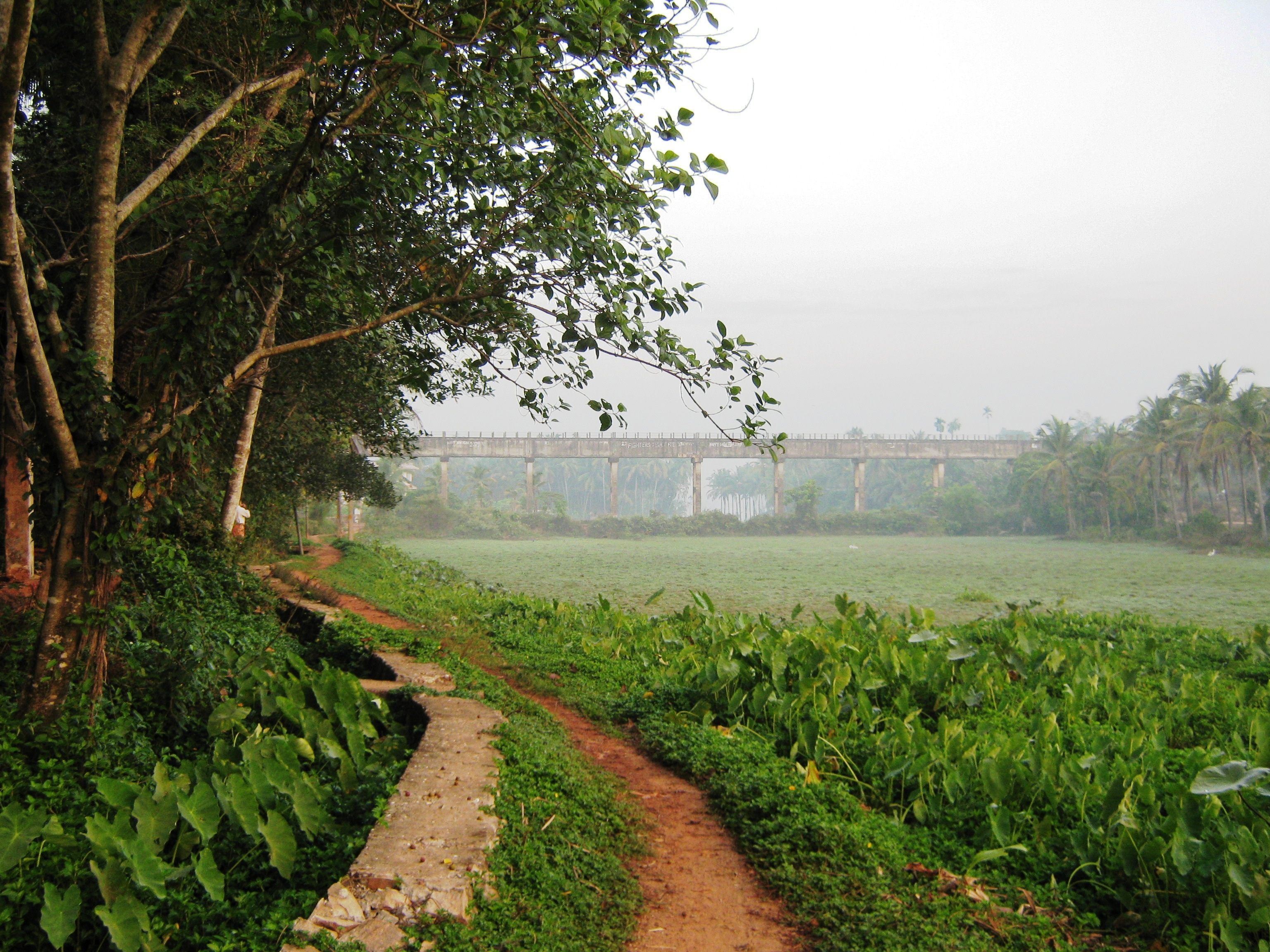 Kannur, Kerala, India.